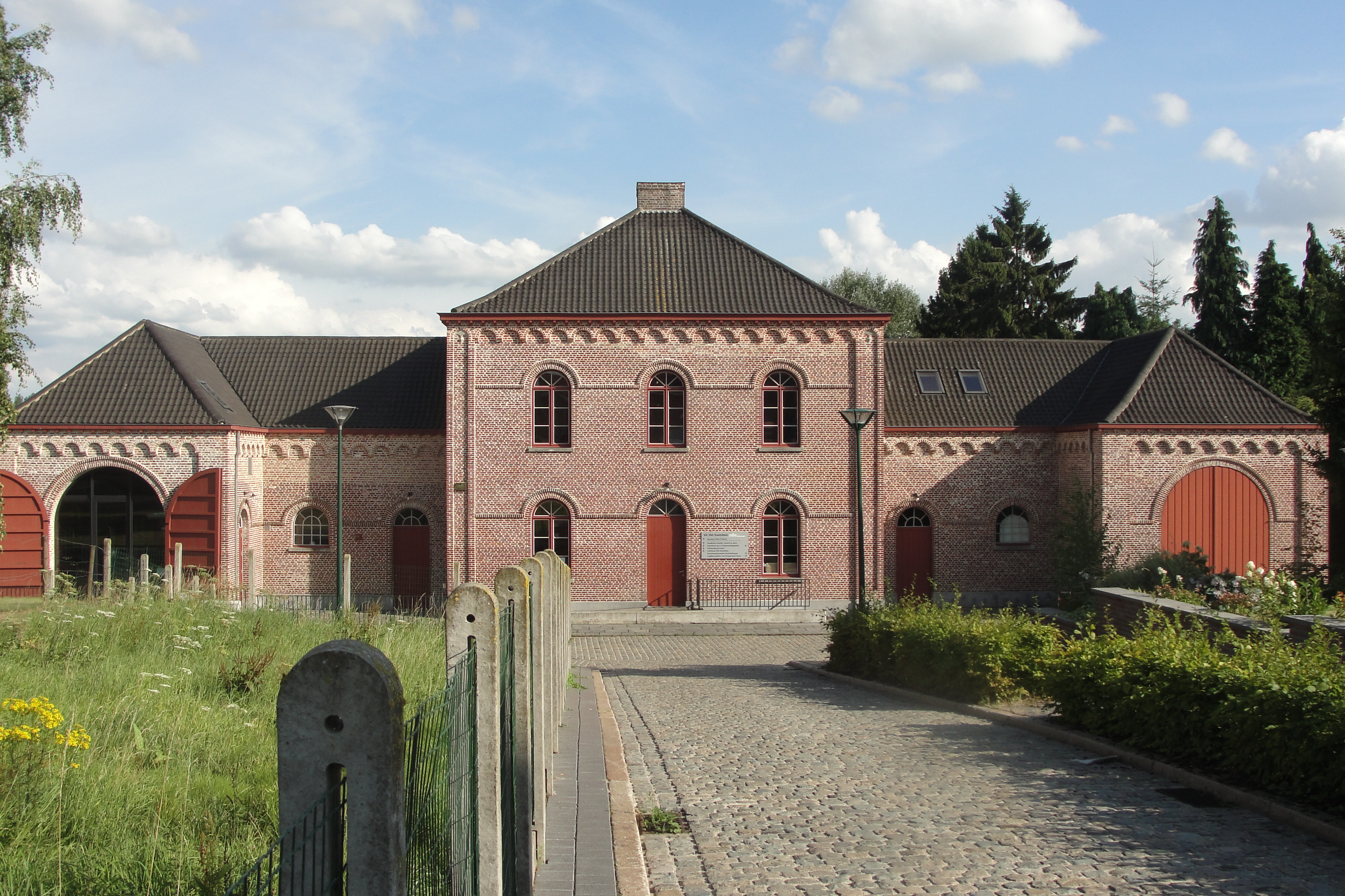 Koetshuis ca. 1868 bij het kasteel van Strijtem, thans in gebruik als Gemeenschapscentrum Het Koetshuis.